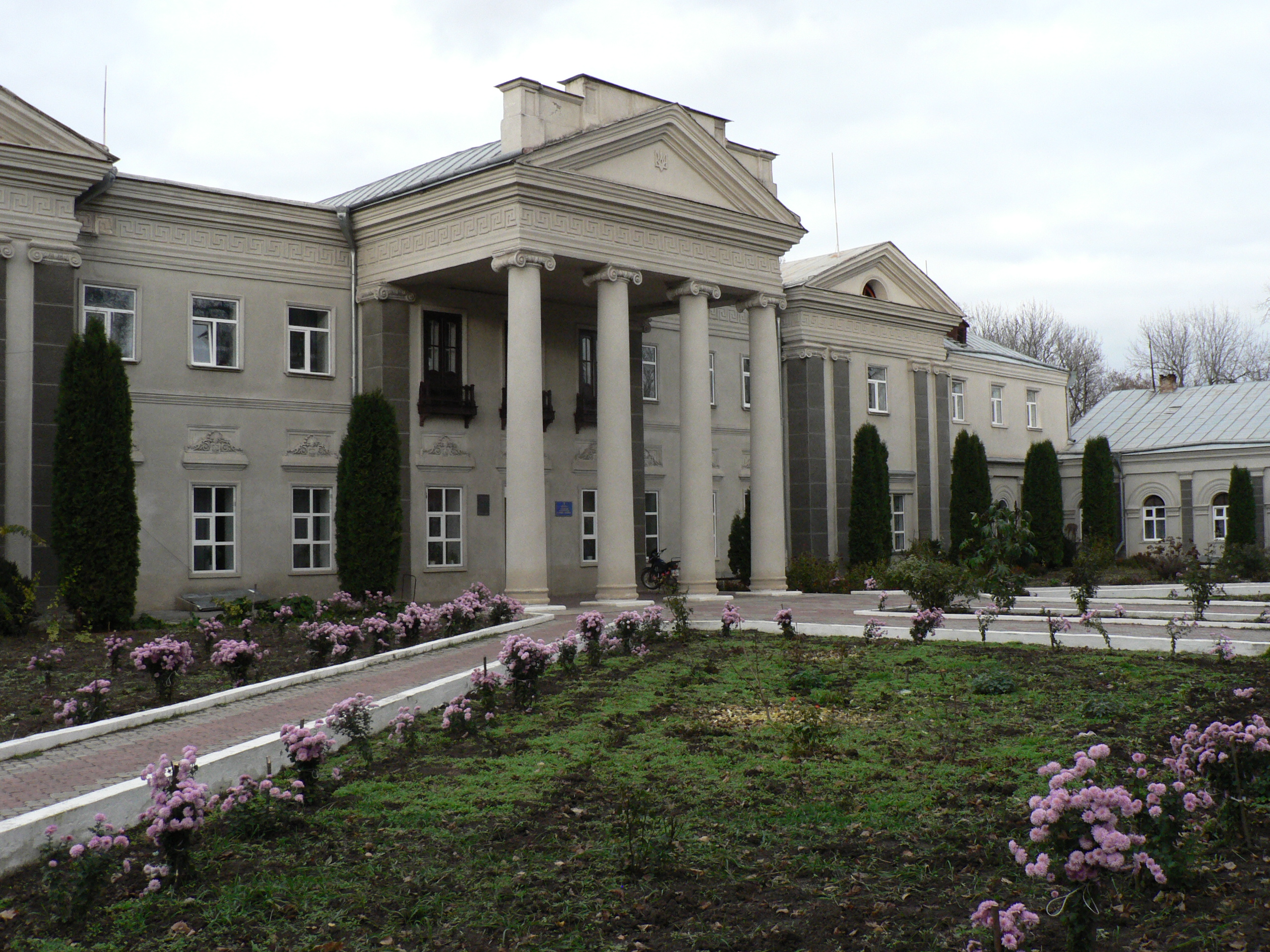 Палац в парку с. Антопіль Марківської с/р Томашпільського району